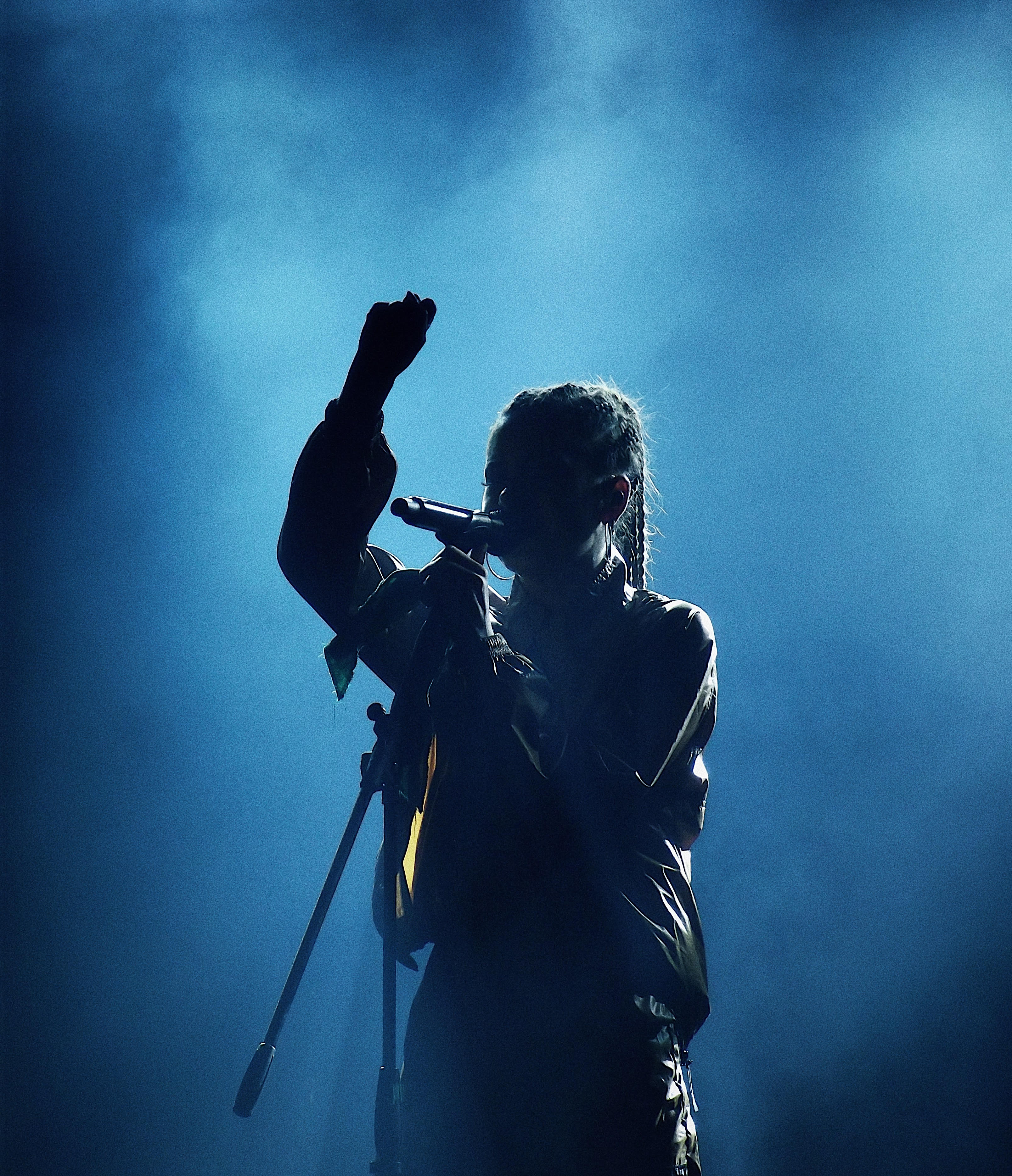 Concierto en Chimbarongo